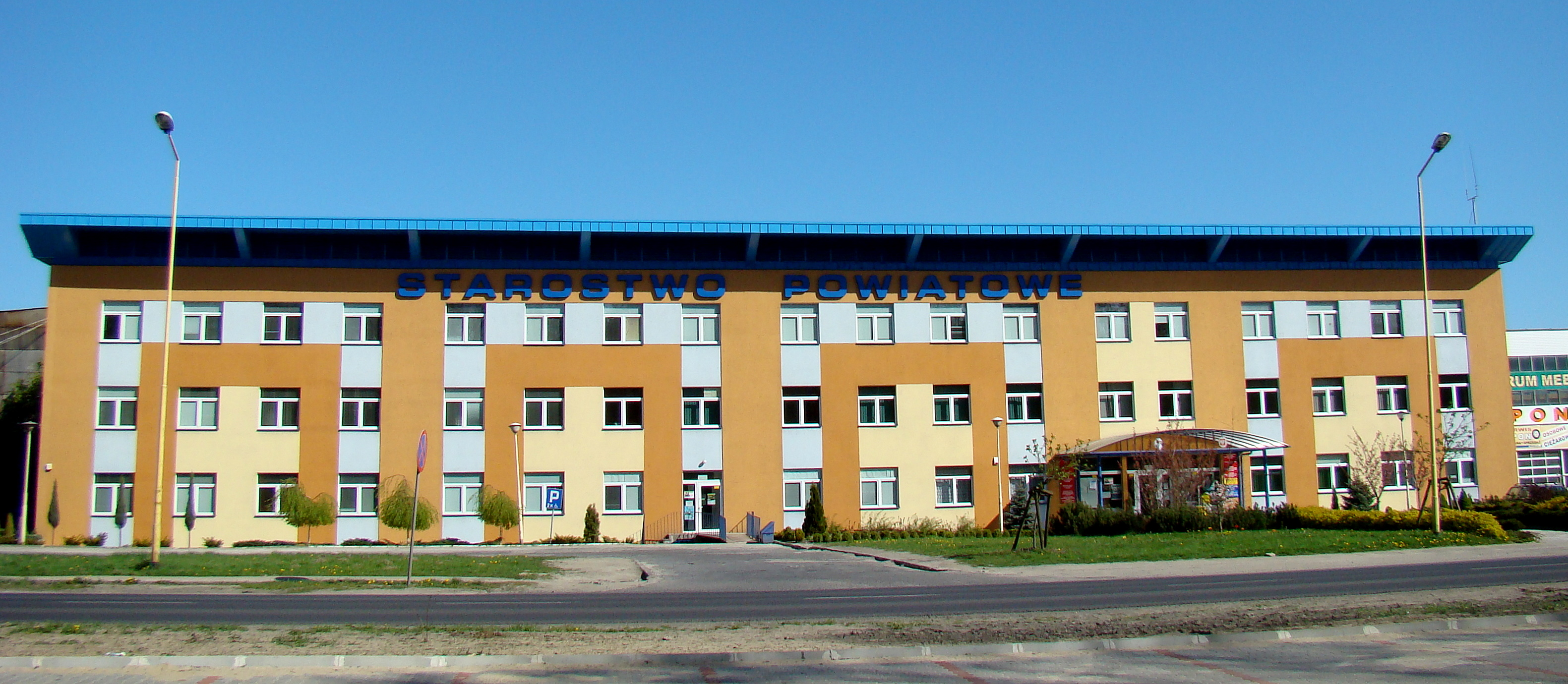 Starostwo Powiatowe w Policach, siedziba, ul. Tanowska (Police, Województwo zachodniopomorskie), Polska